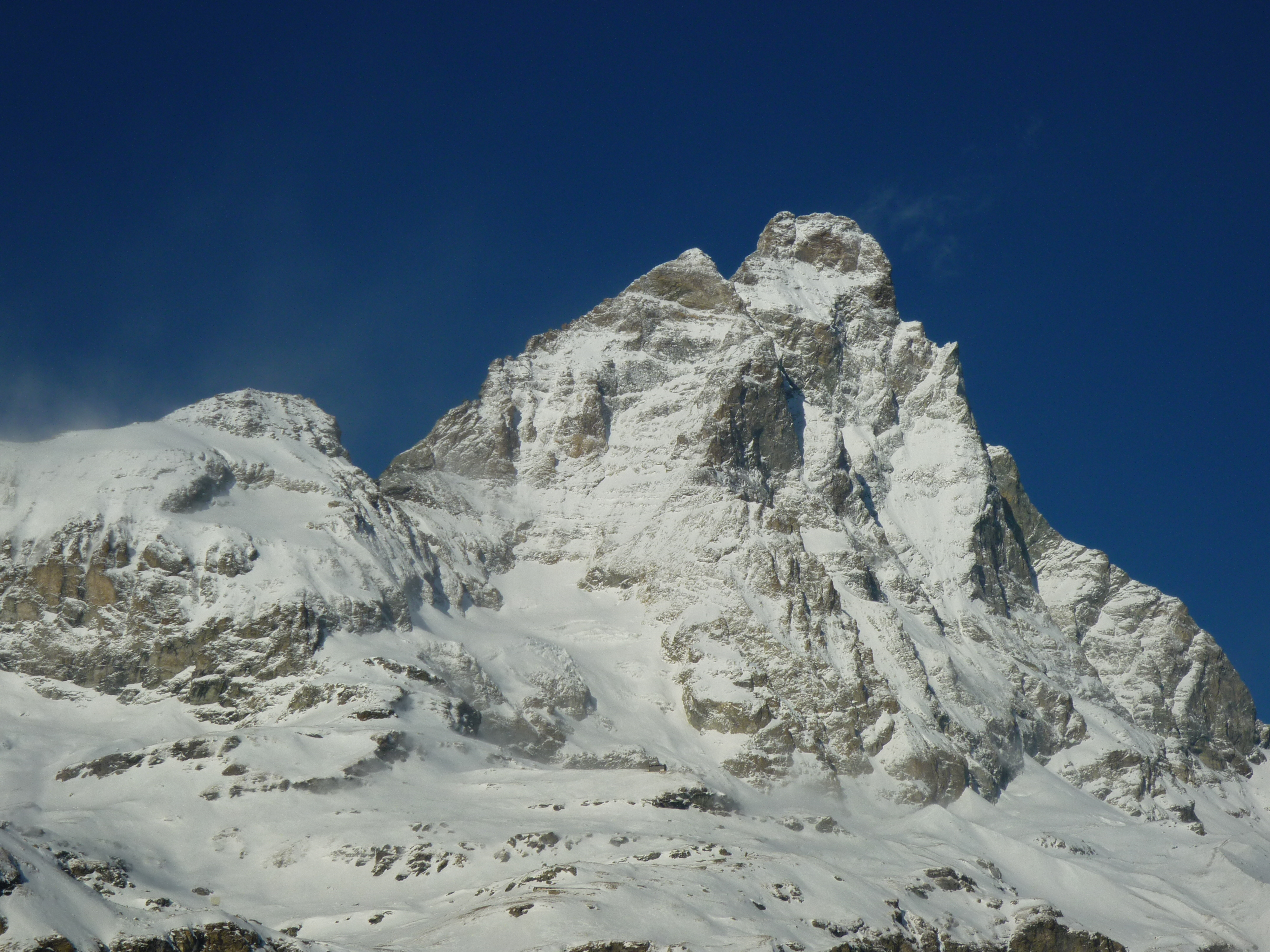 Le Cervin vu du Breuil (Valtournenche - Italie)